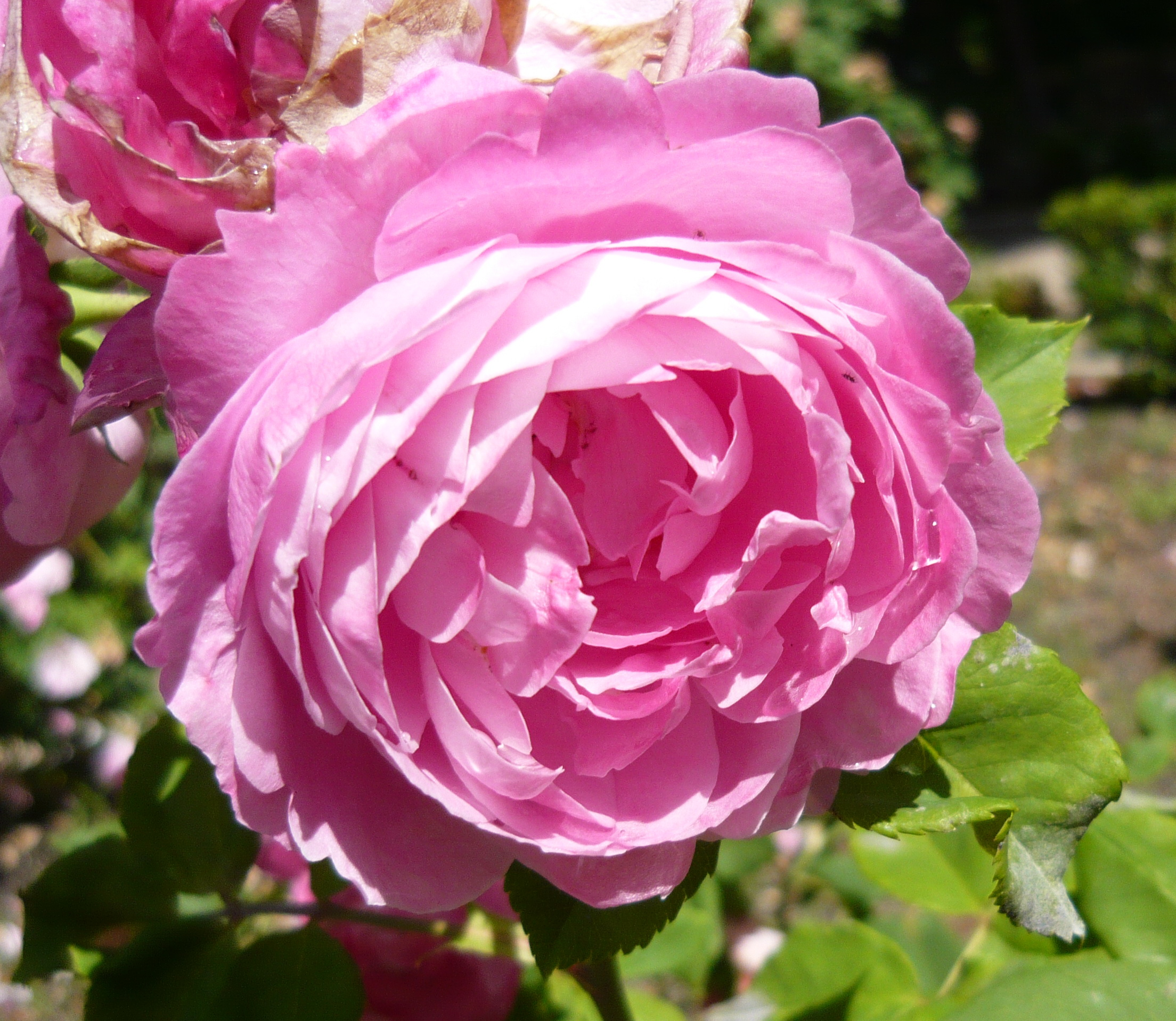 Rosa 'La Reine Victoria'. Real Jardín Botánico de Madrid.